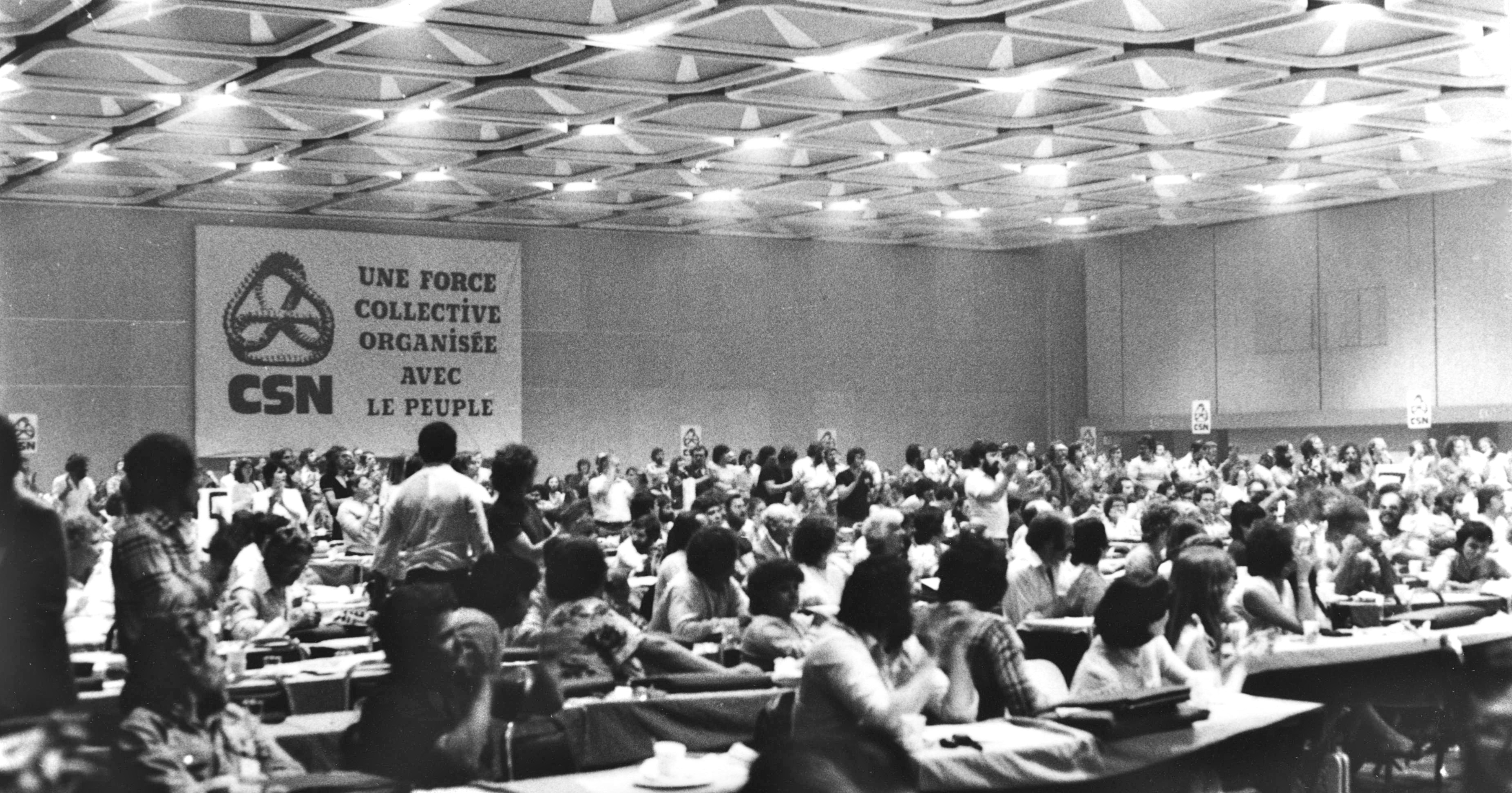 50e congrès de la Confédération des syndicats nationaux (CSN), en 1980, au Centre des congrès de Québec